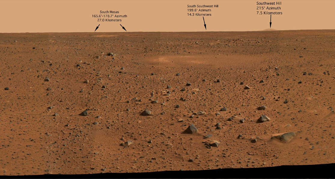 Gusev-Krater Mars, Southwest Hills, Landestelle Spirit (MER-A)